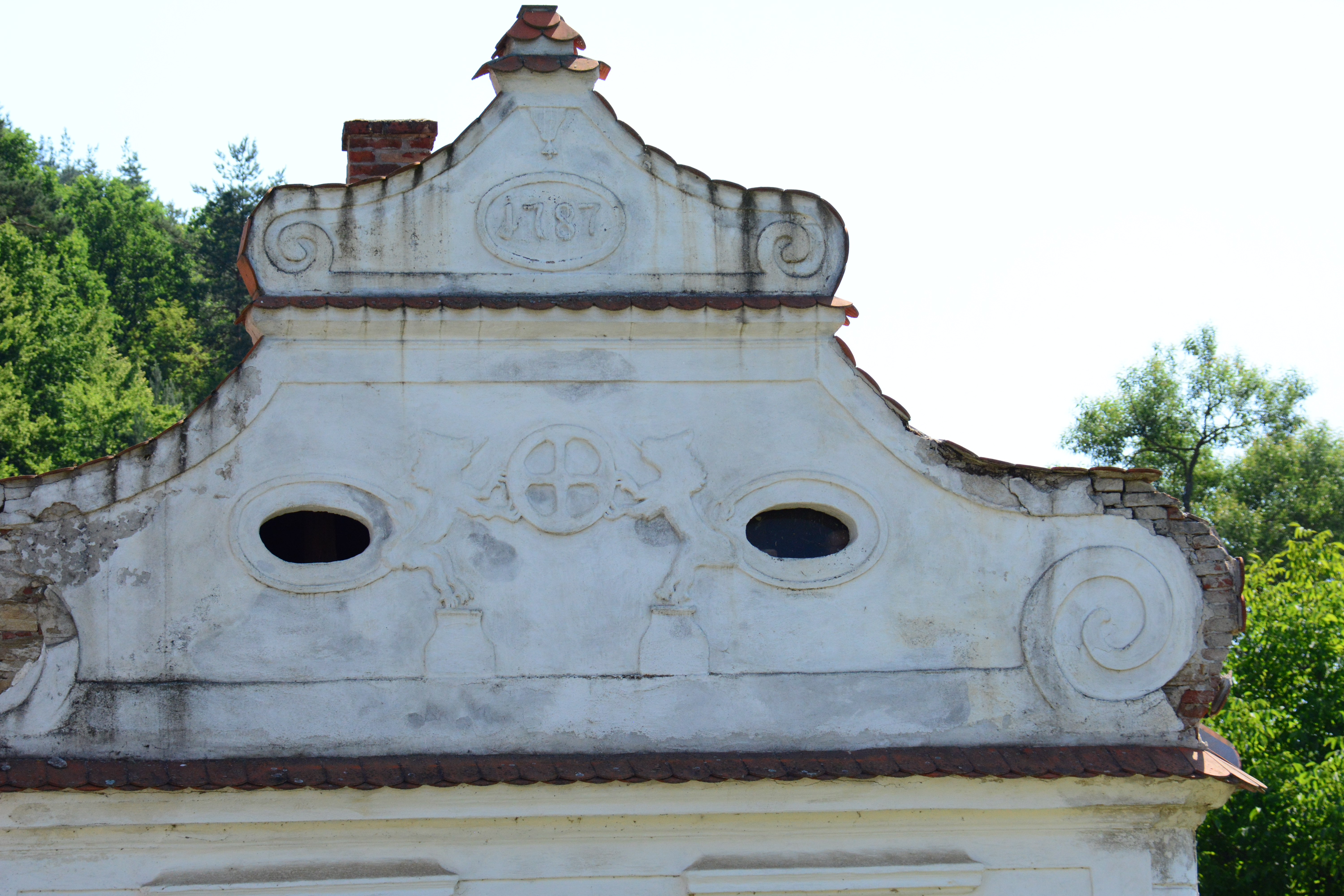 Giebel der Mühle in Podhradí nad Dyjí - Freistein in Südmähren (Tschechische Republik)